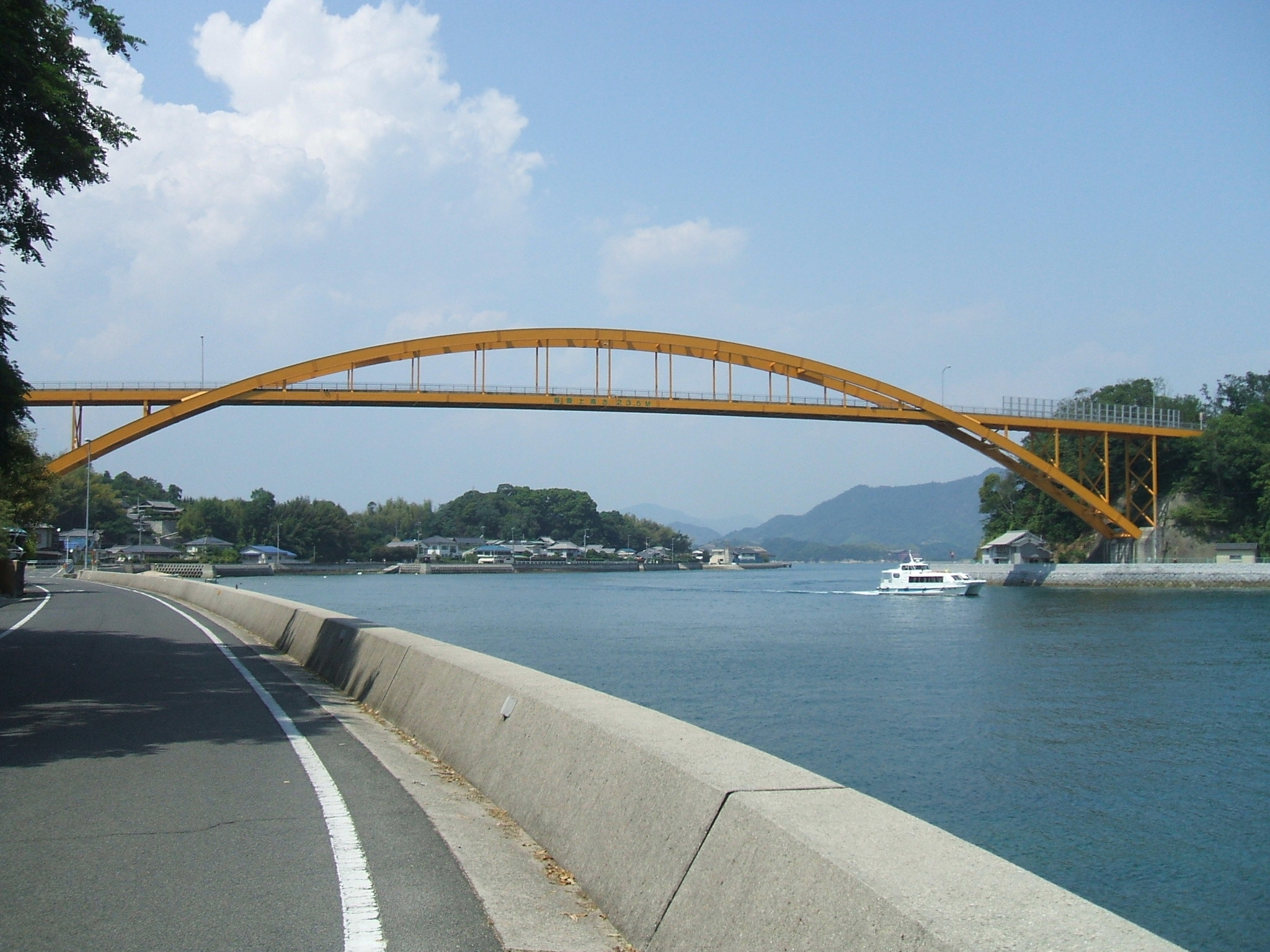 広島県尾道市にある生口島と高根島を結ぶ高根大橋